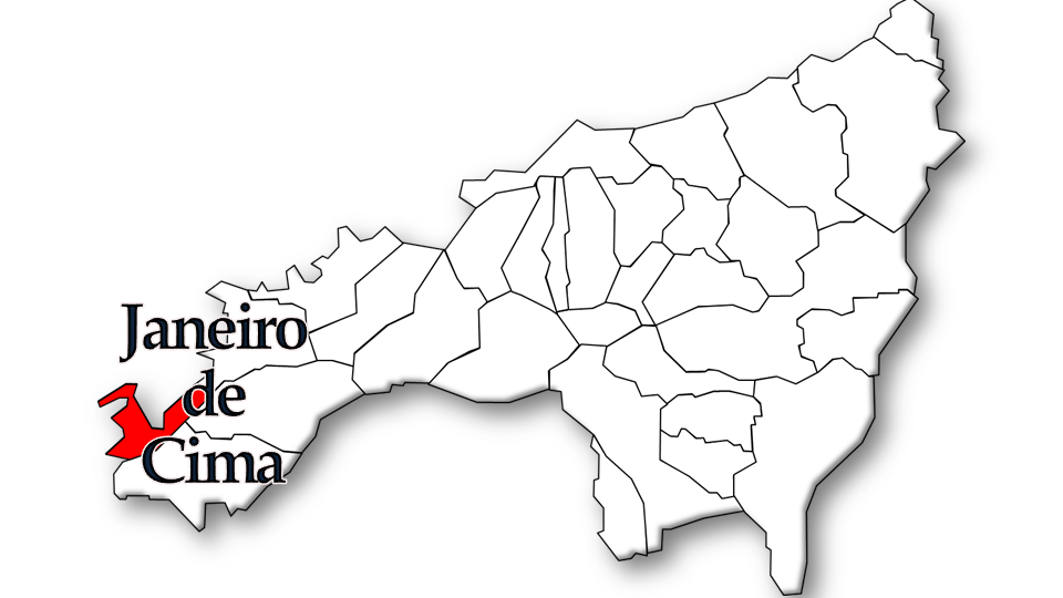 População